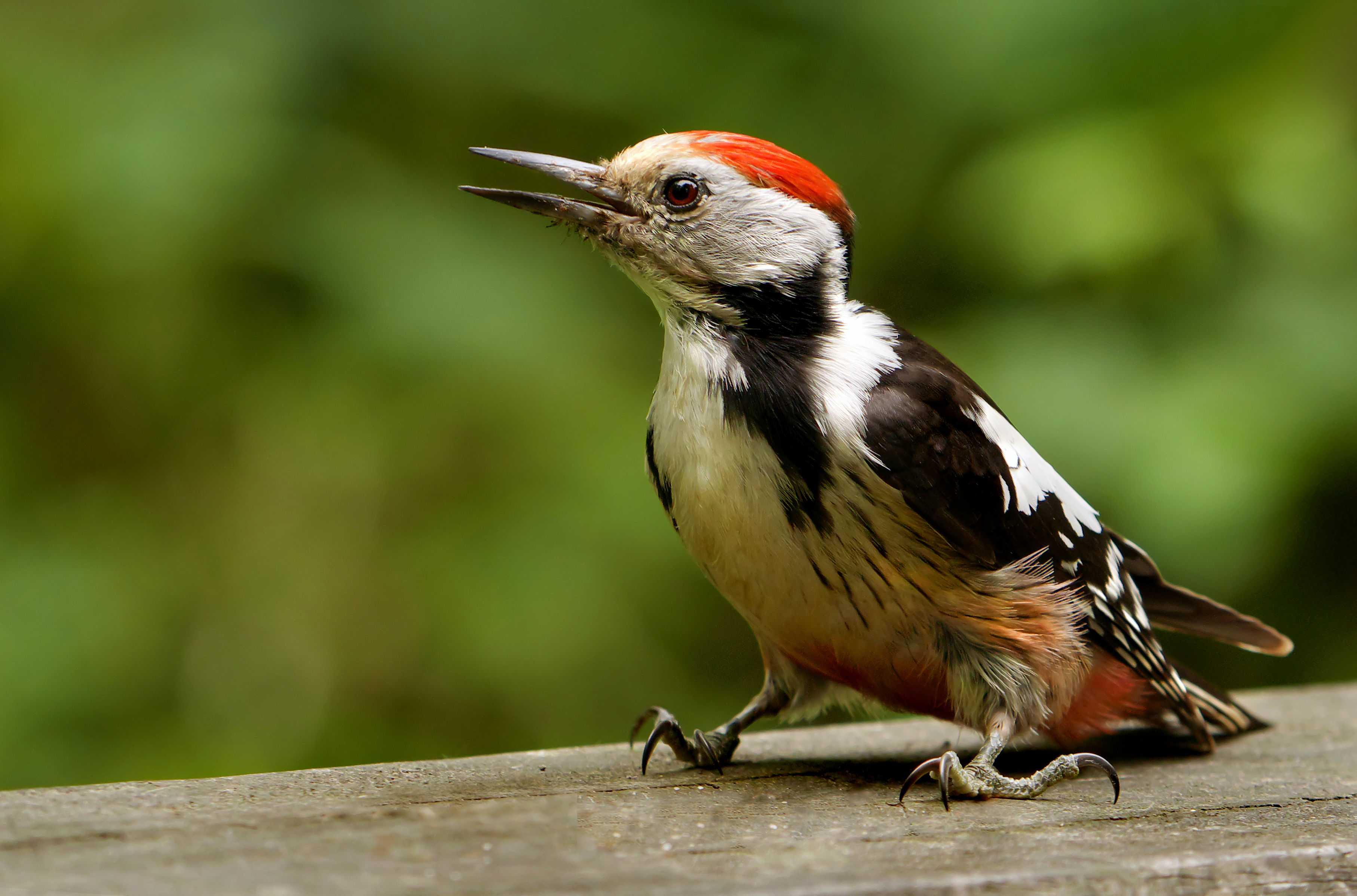 Panasonic GX7 + Panasonic Lumix G Vario 100-300, O.I.S